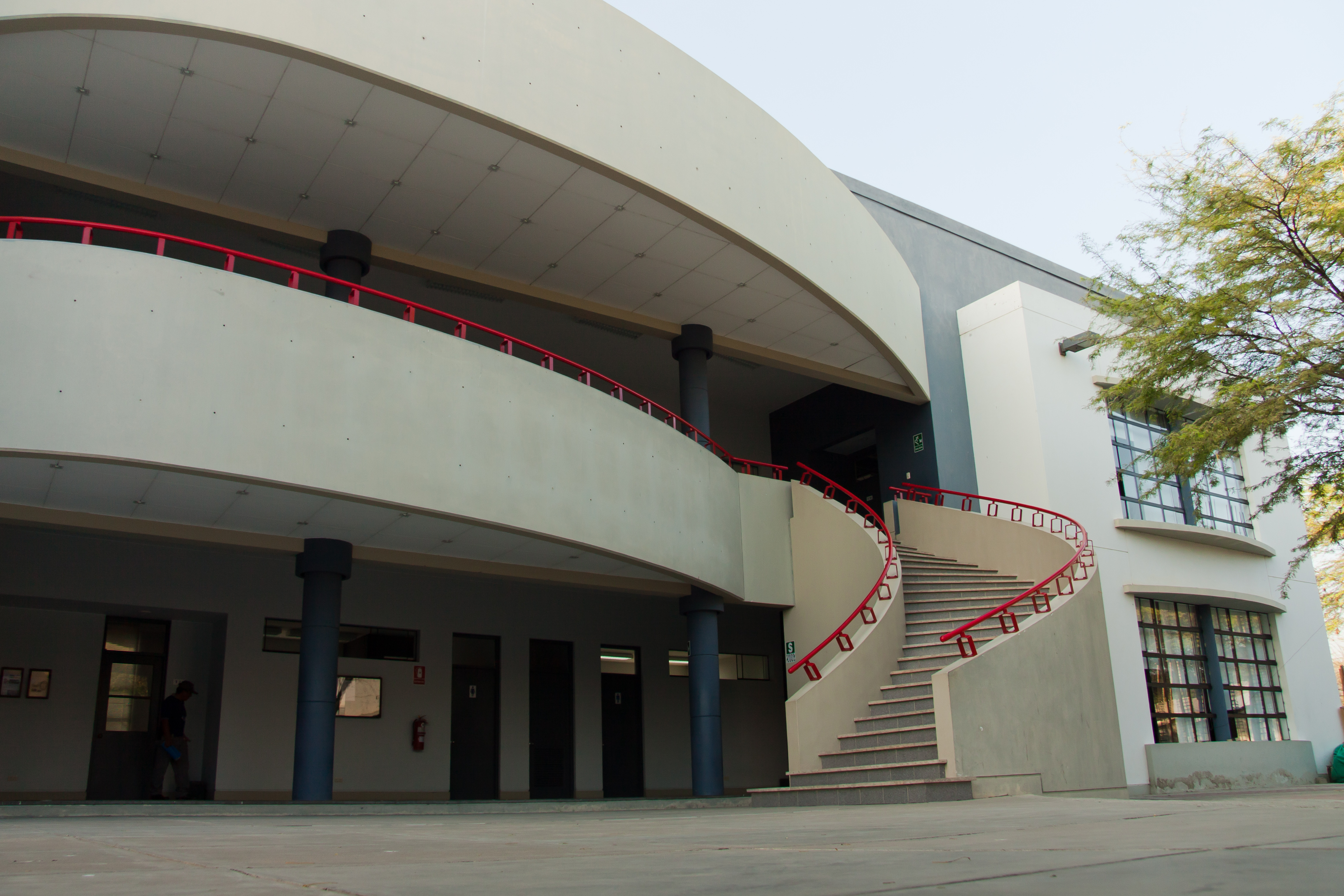 Edificio de la Escuela Tecnológica Superior de la Universidad de Piura - UDEP